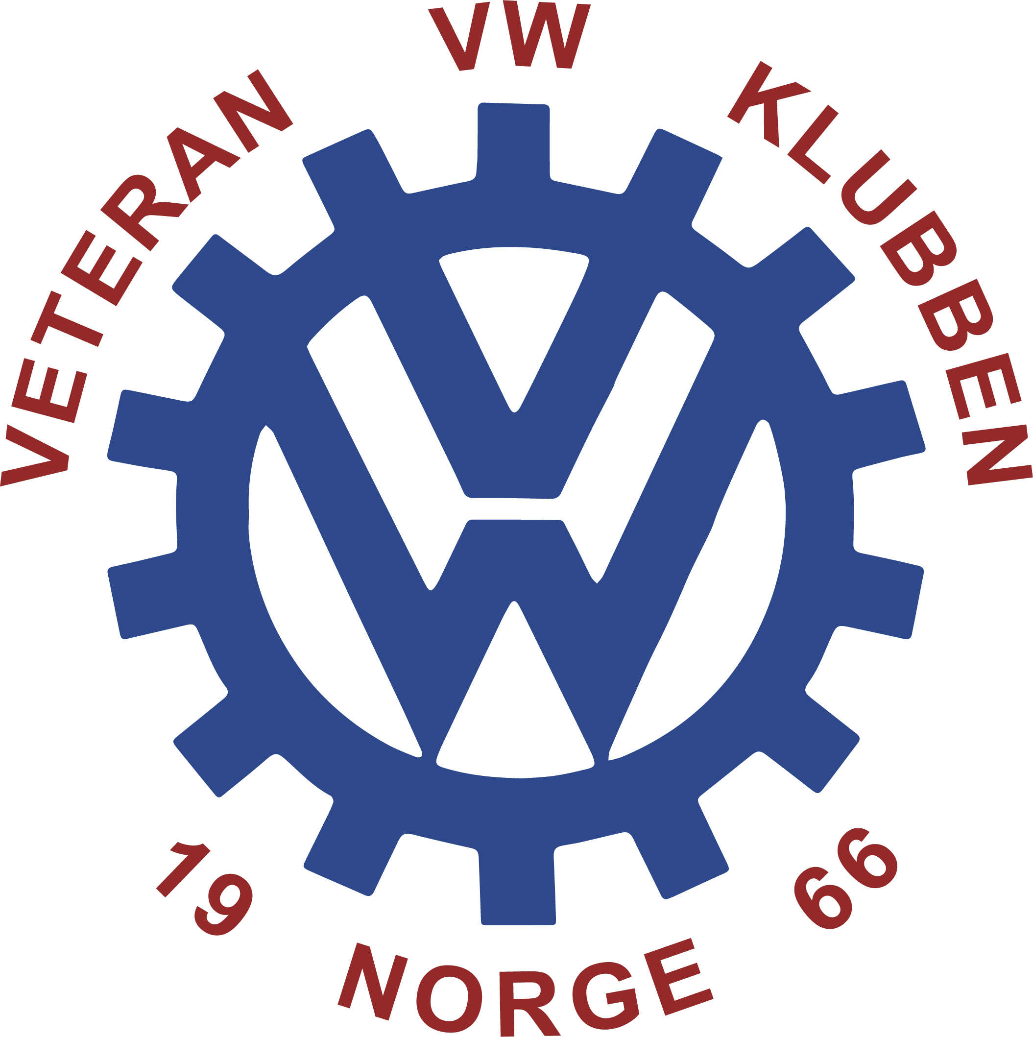 Veteran VW klubben - Logo Bassert med VW merke med rettighet til bruk fra Harald A. Møller.